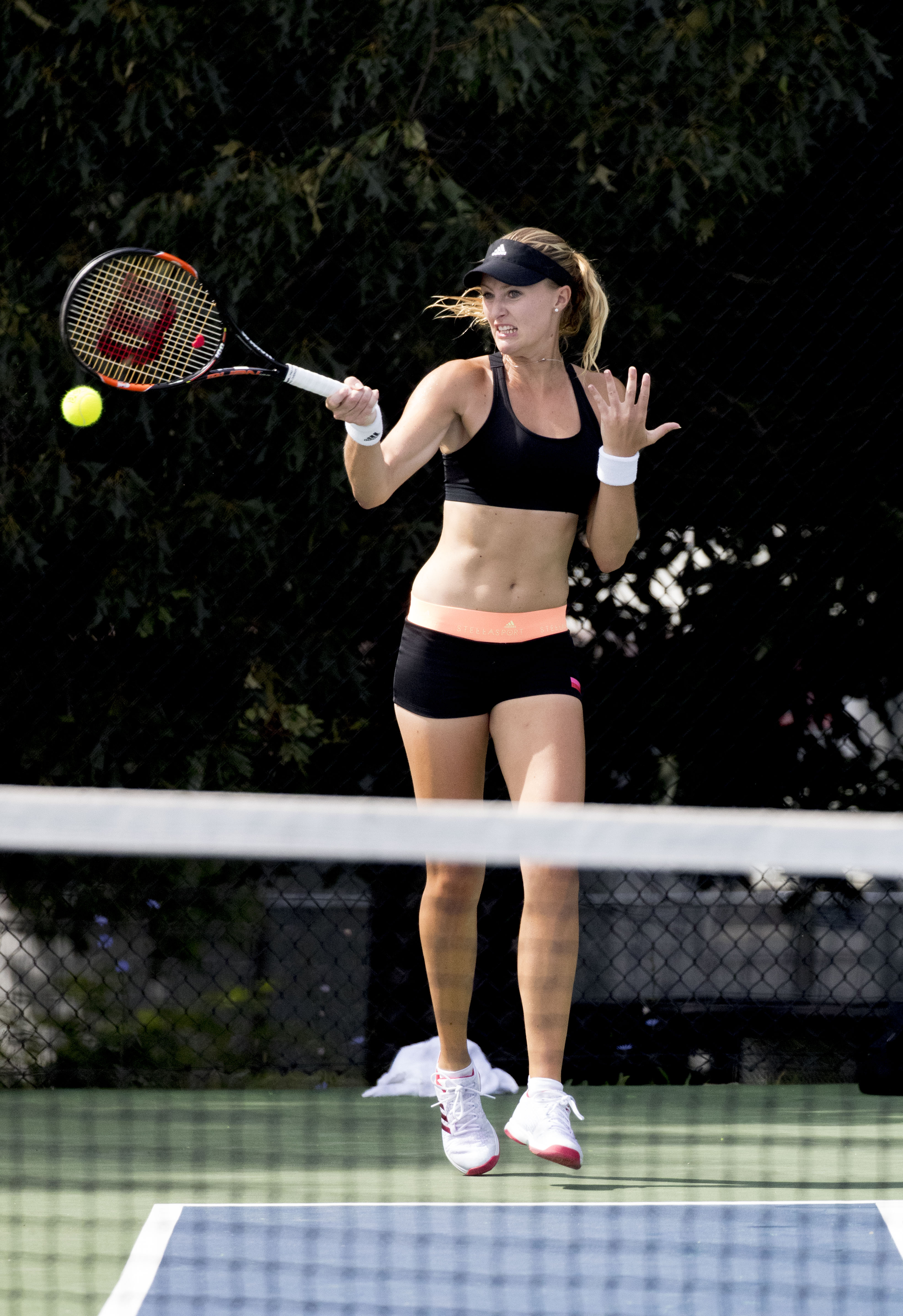 2016 Citi Open